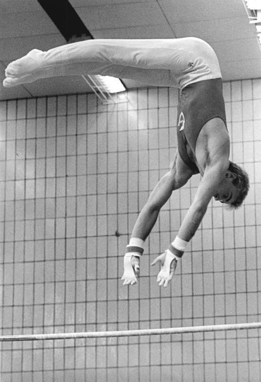 Sylvio Kroll ADN-ZB Thieme 18.8.89 Karl-Marx-Stadt: Turnen-Bei den DDR-Meisterschaften im Turnen ging Sylvio Kroll (SC Cottbus) nach der Pflicht mit 56,80 Punkten in Führung.